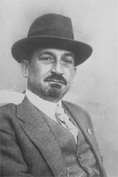 חיים ויצמן